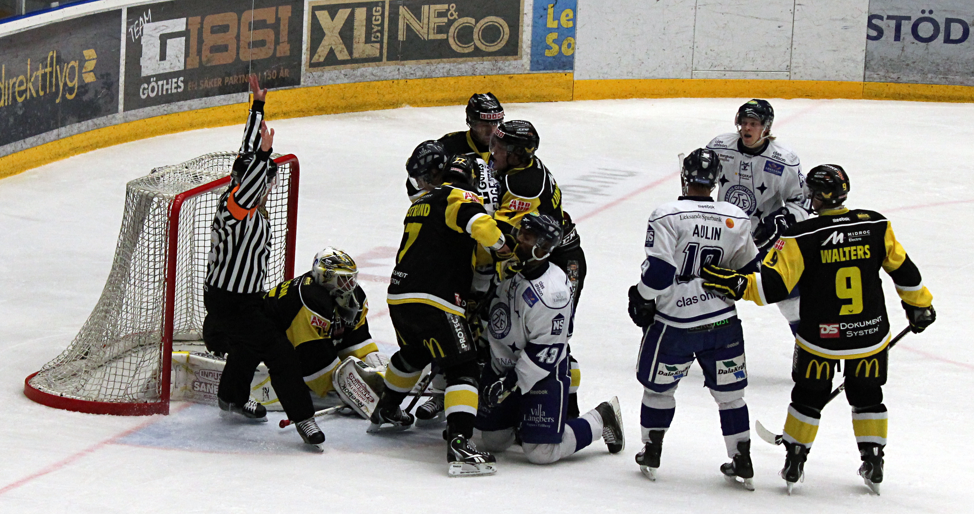 Jens Bergenström och Jean-Luc Grand-Pierre i Leksands IF mot Johan Gustafsson (målvakt), Alexander Ribbenstrand, Niclas Lundgren och iodentifierad forward i VIK Västerås HK 29 januari 2011.